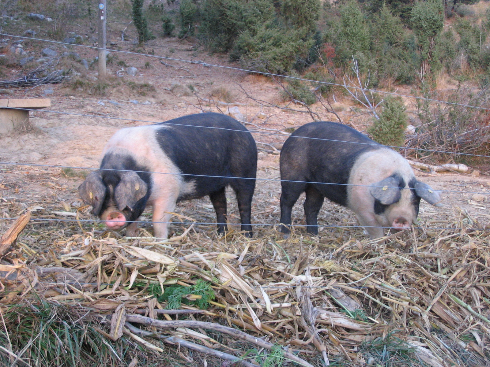 Krškopoljski prašič na paši.